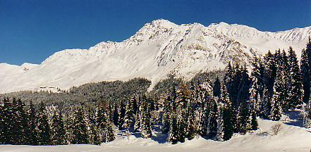 Parpaner Rothorn, Lenzerheide, Schweiz